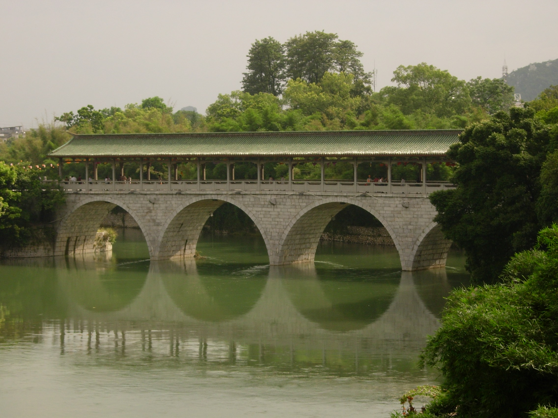 中文（中国大陆）: 桂林花桥